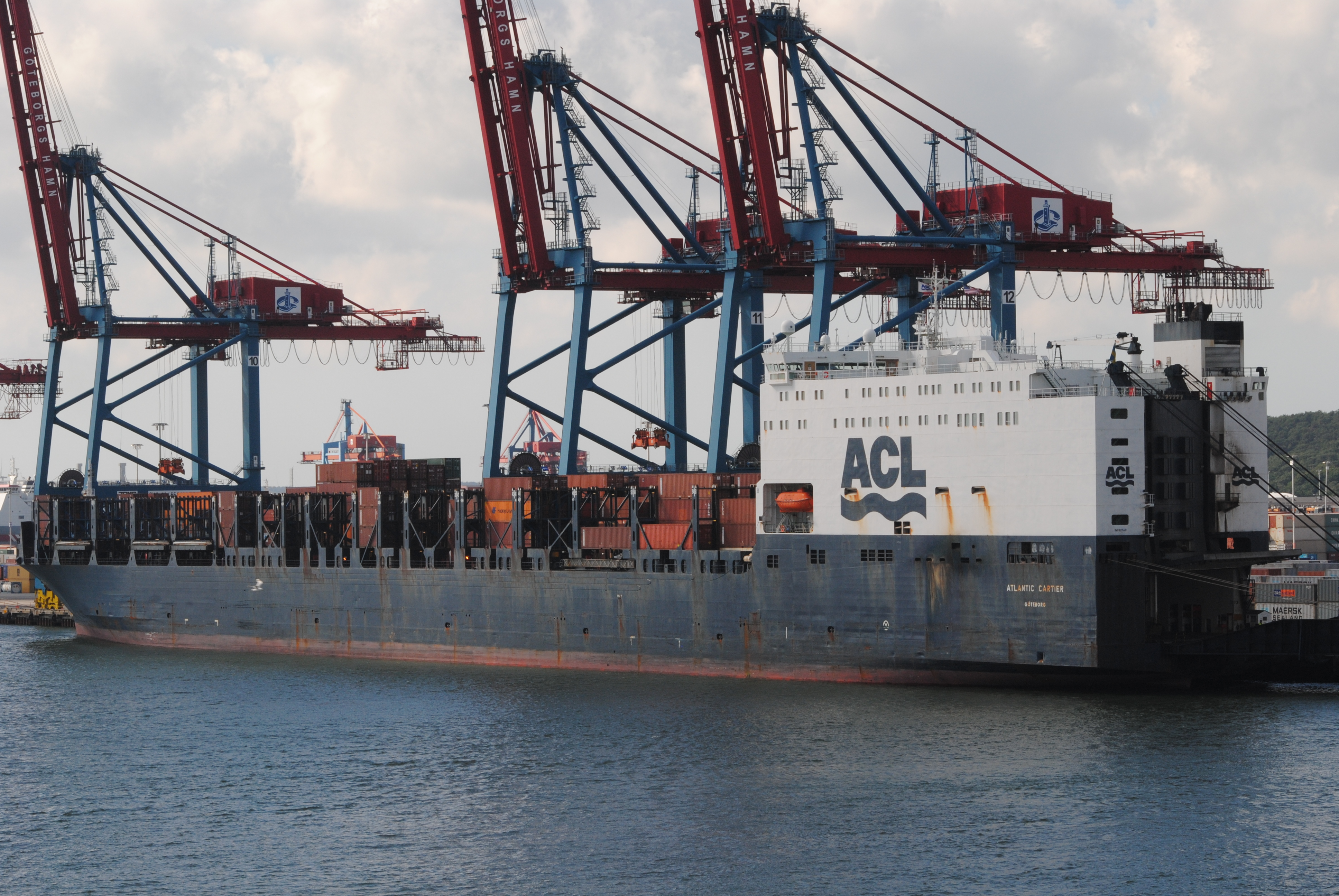 Atlantic Cartier Vid Skandiahamnen i Göteborg.